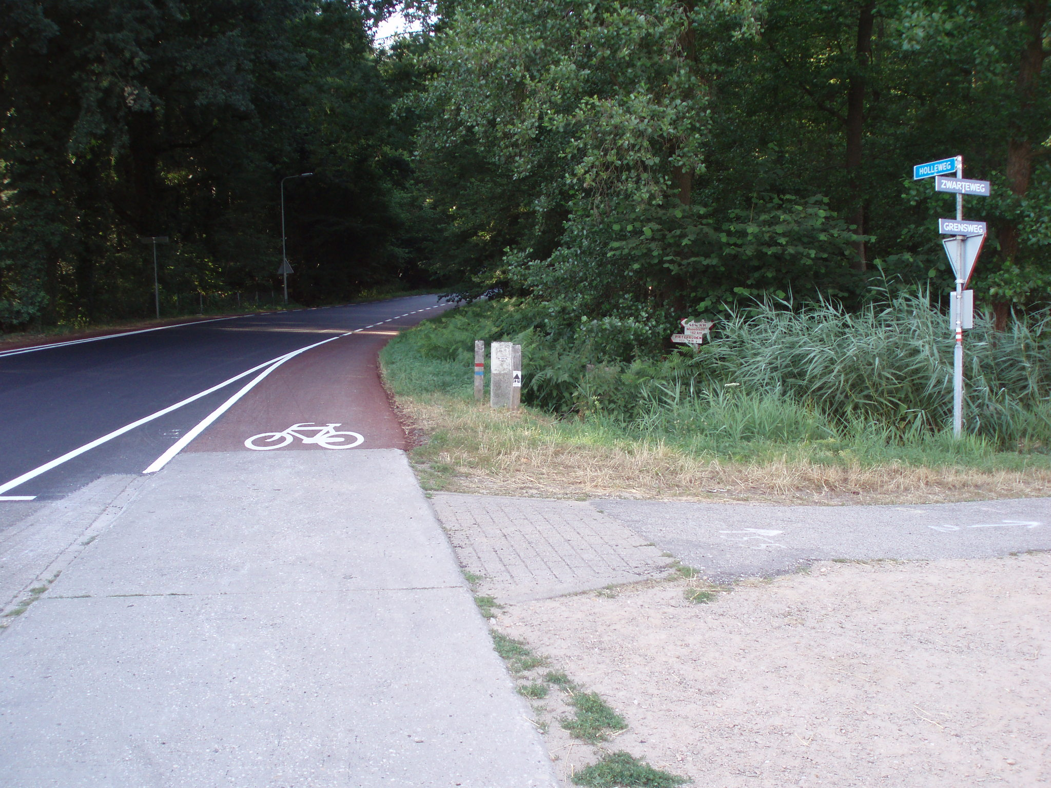 eigen foto 2006 (c) looi